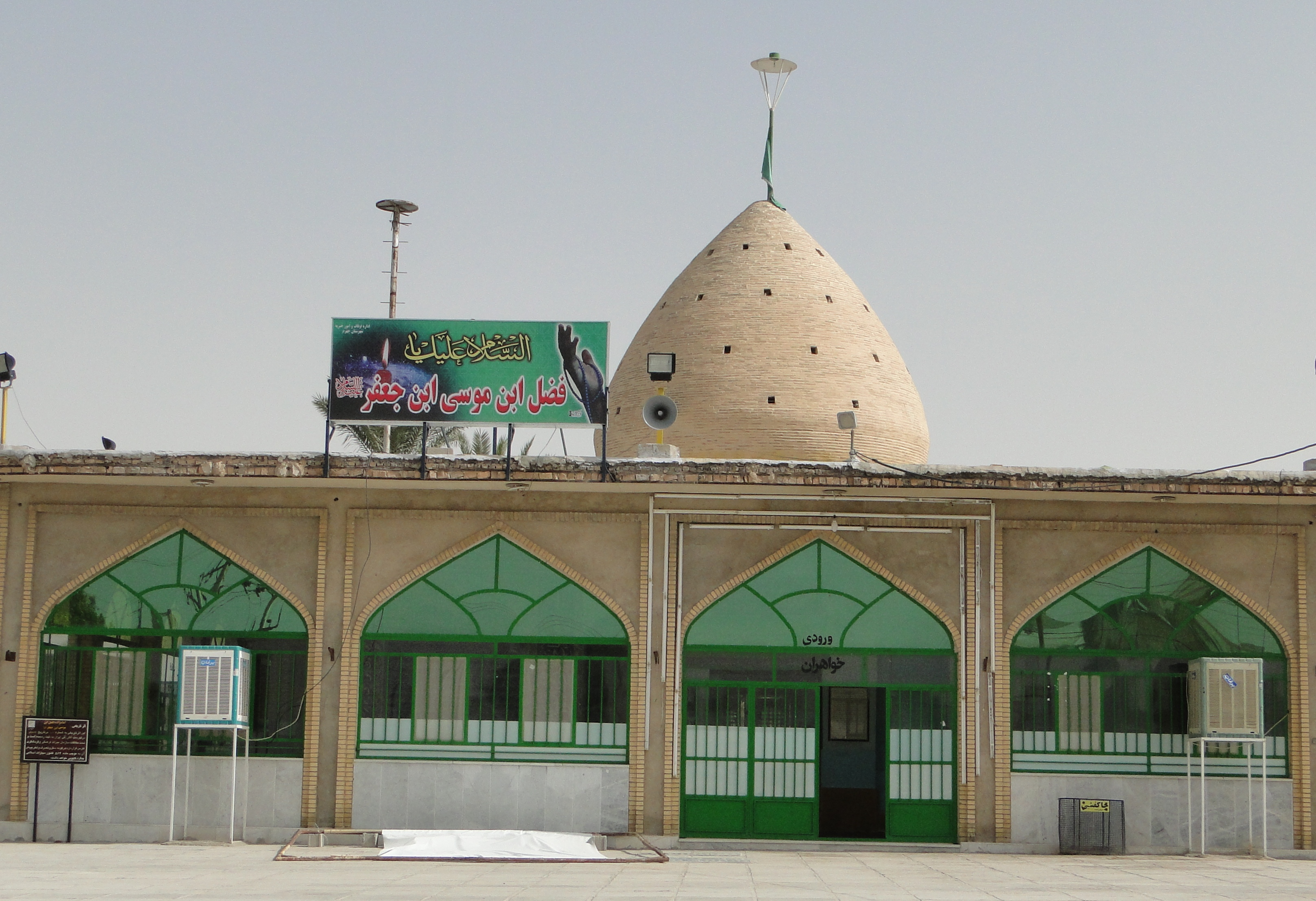 امامزاده فضل بن موسی(ع) در شهرستان جهرم